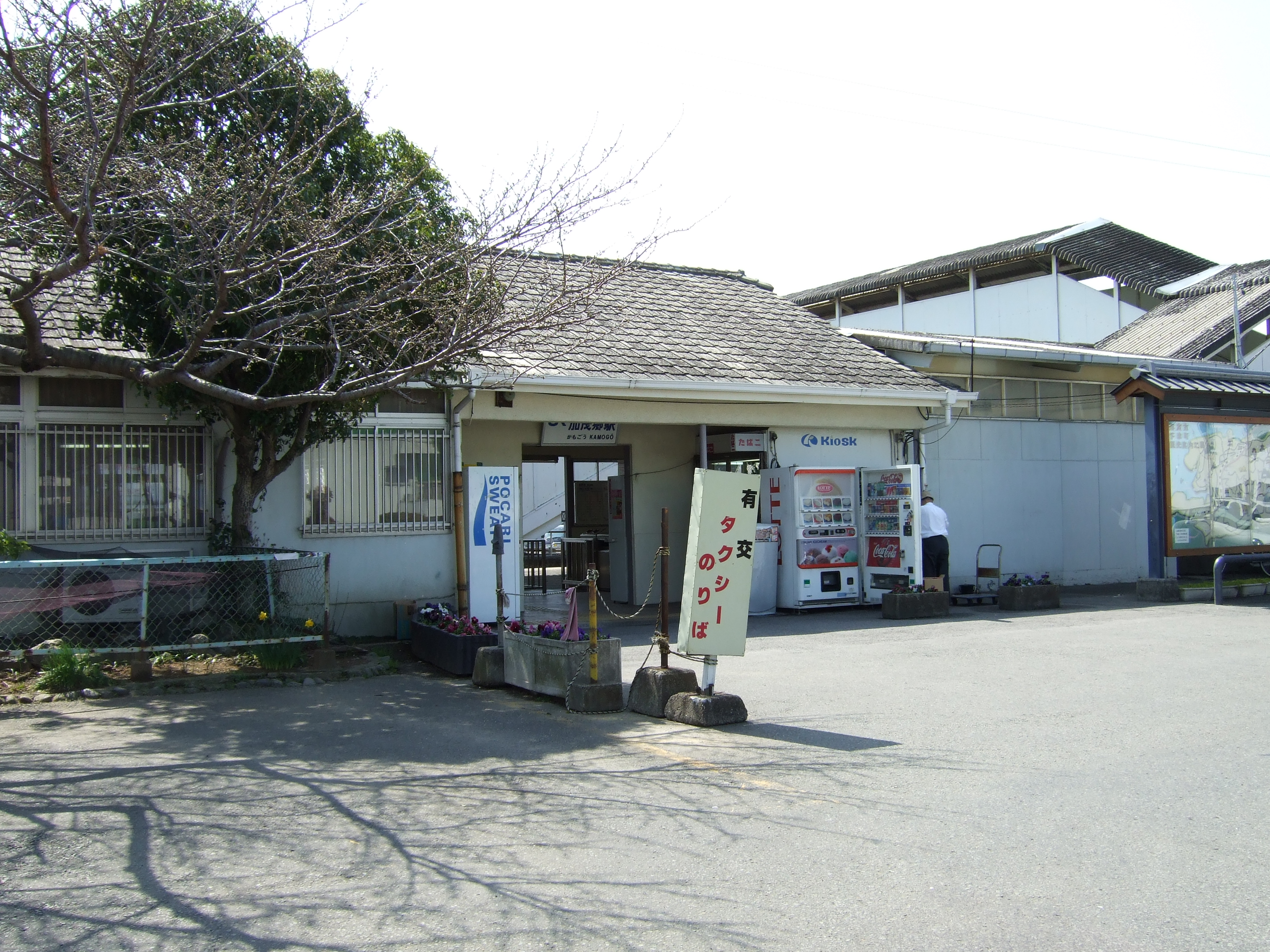 加茂郷駅